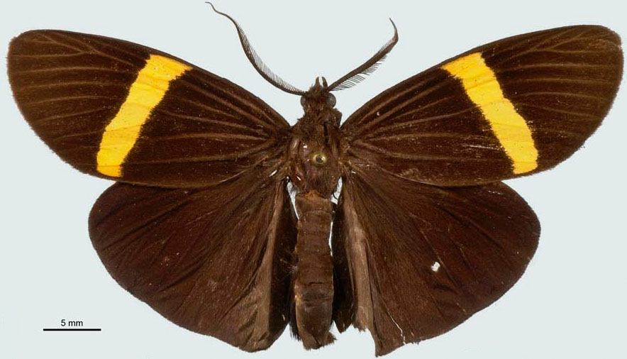 Phavaraea dilatata